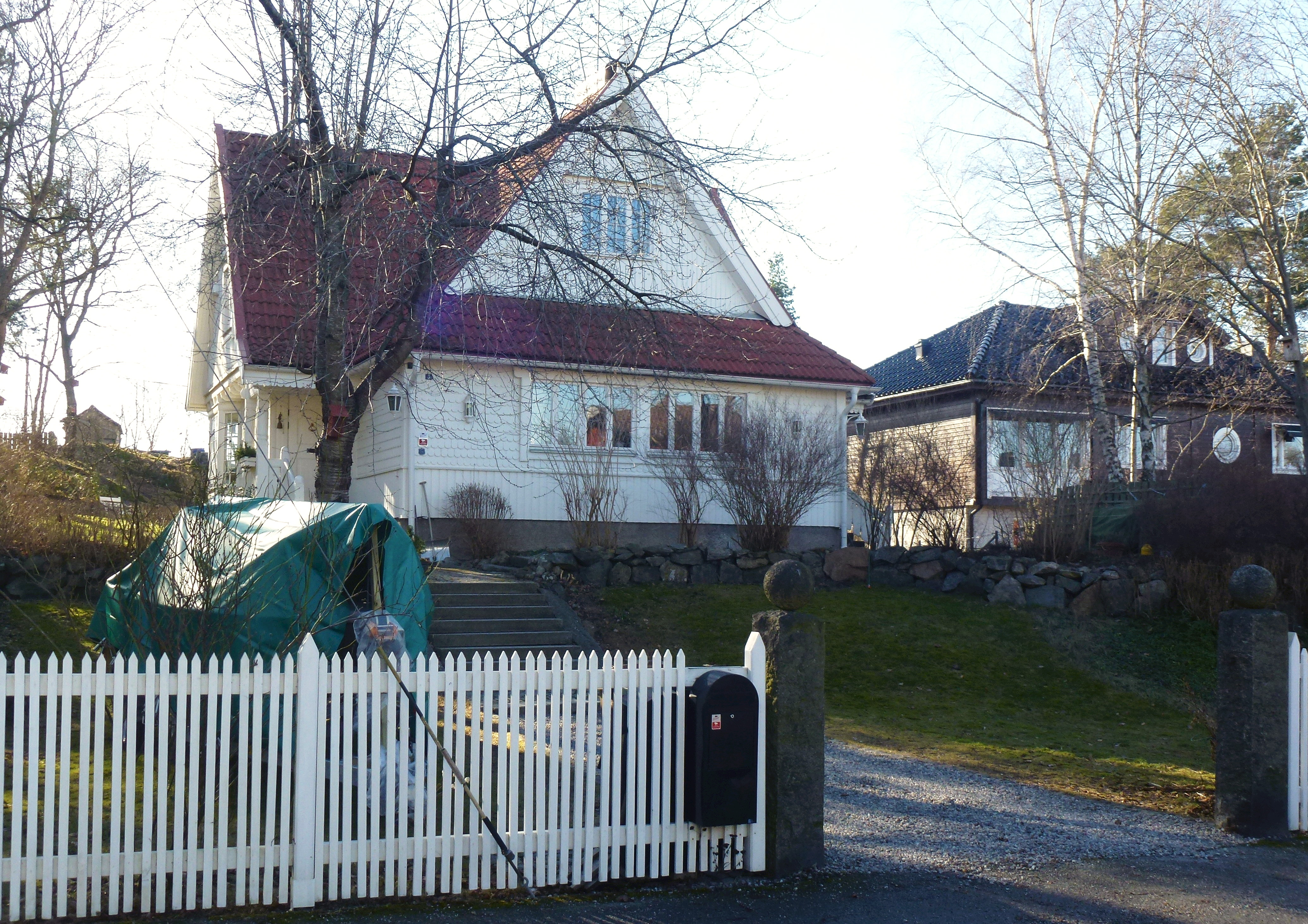 Villa vid Falkvägen 5 Älvsjö, utnämndes av tidningen "Vi i villa" till "Sveriges vackraste villa 2011". Den uppfördes 1912 av bildhuggare Carl Gustaf Ivar Cederwall som en jaktstuga inspirerad av Anders Zorns villa i Mora och tog fyra år att färdigställa.